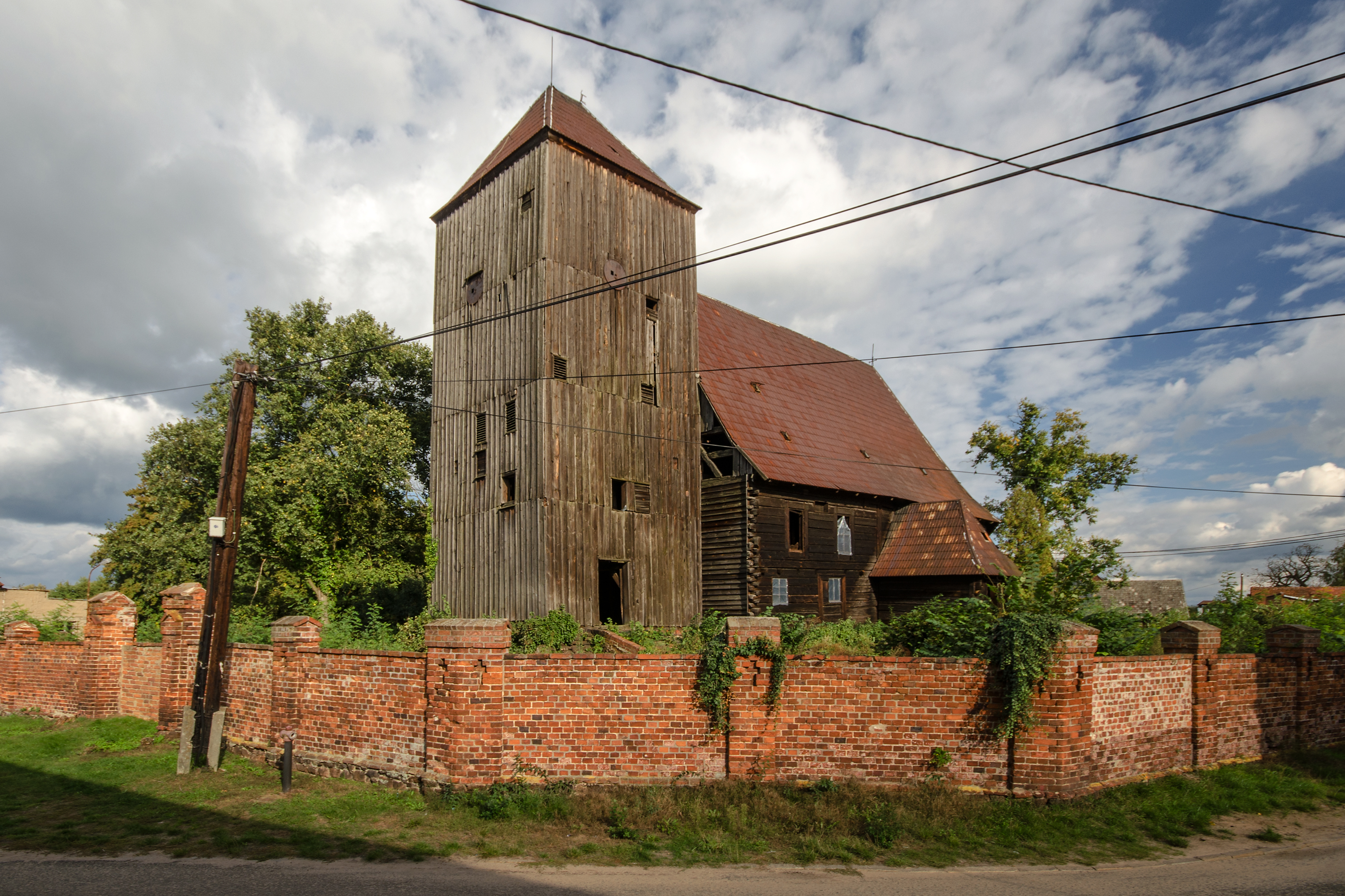 Kuźniczysko, kościół ewangelicki, ob. rzym.-kat. p.w. Niepokalanego Poczęcia NMP, XVIII